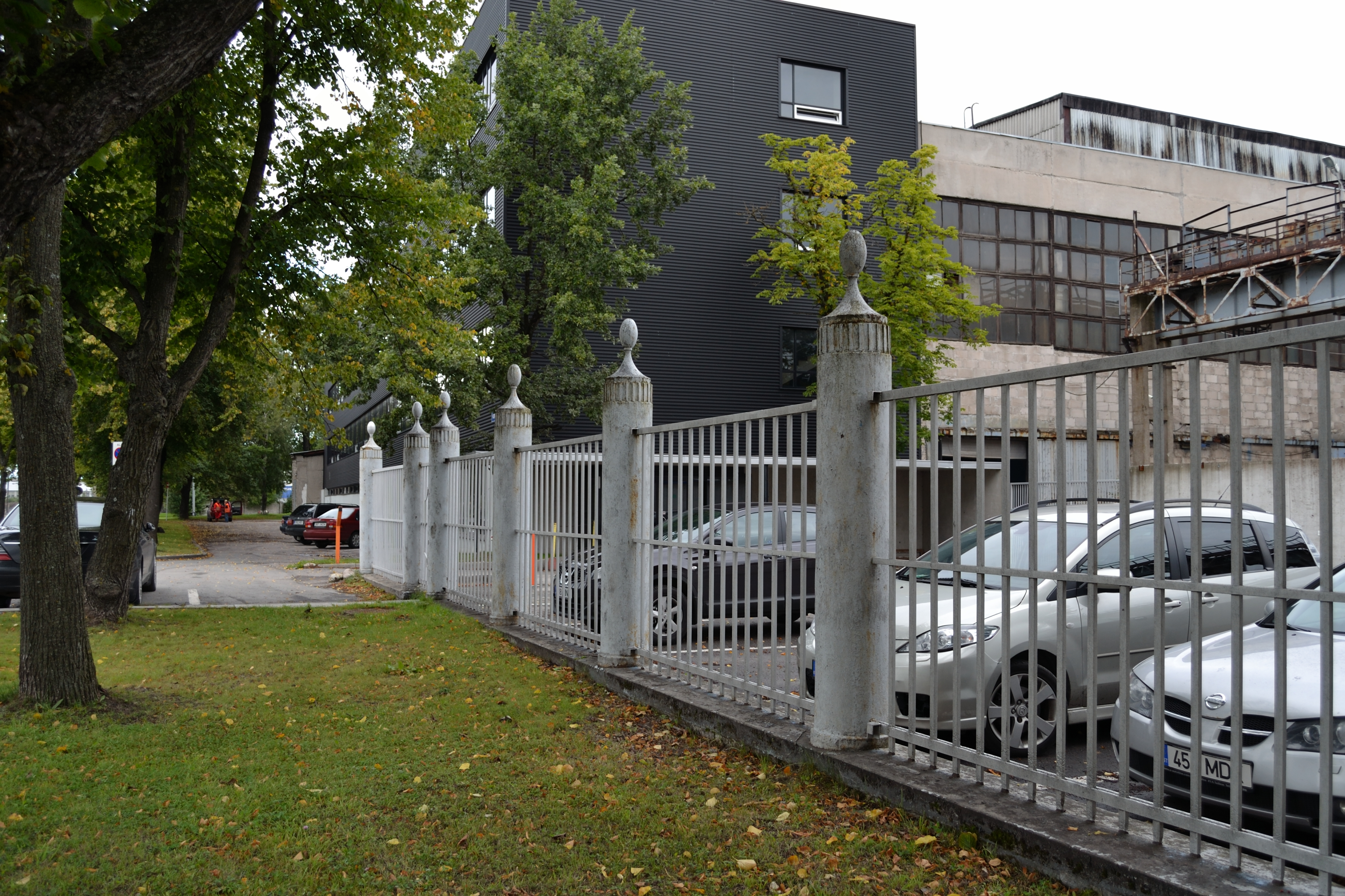 Tallinn, Franz Krulli masinatehase malmaed, 1931